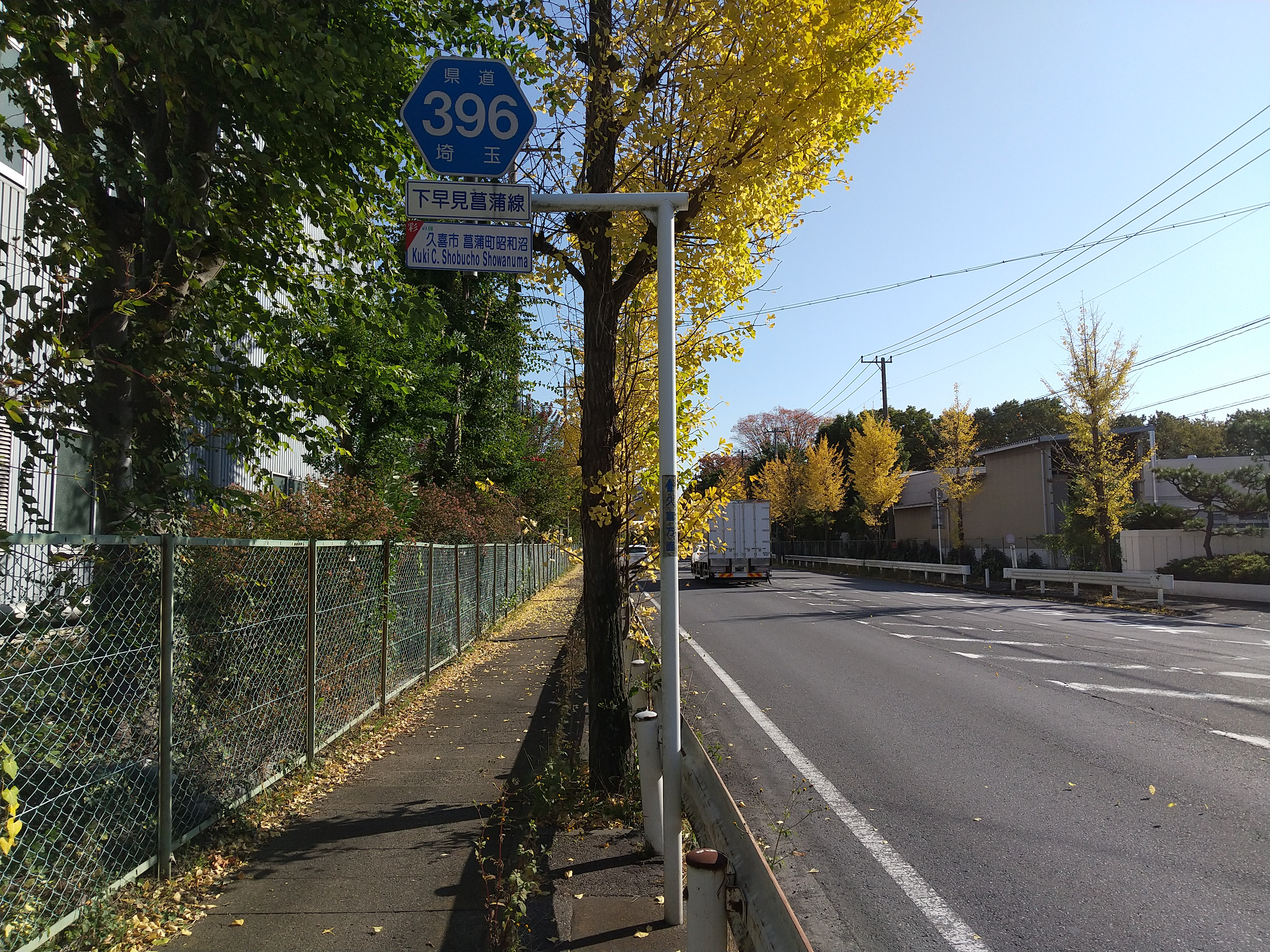 埼玉県道396号 久喜菖蒲工業団地にて